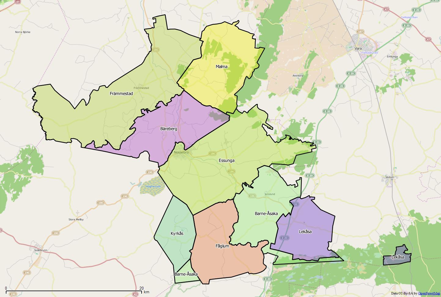 Distriktsindelningen i Essunga kommun